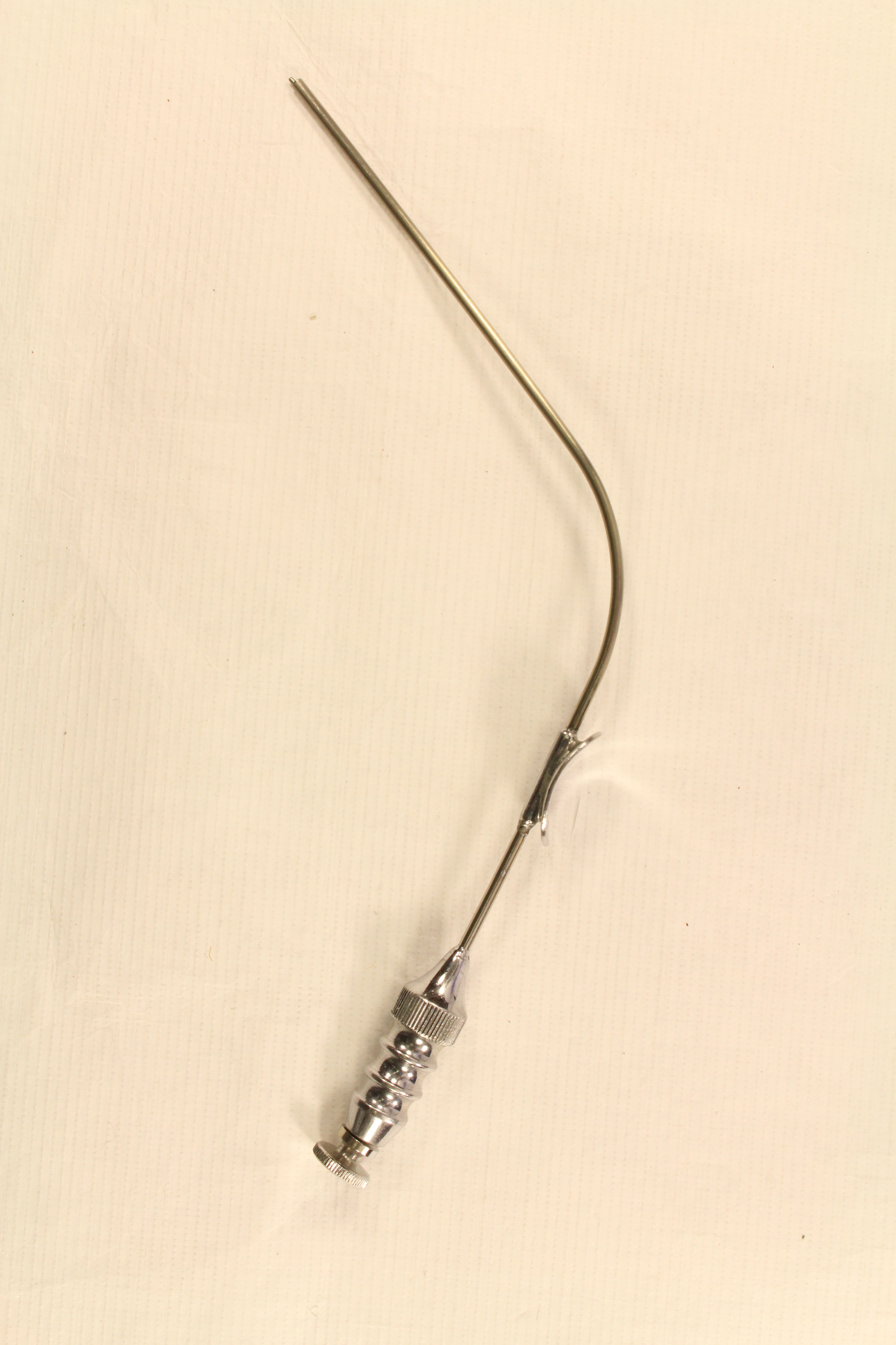 aiguille dite d'Emmet pour les sutures rapides